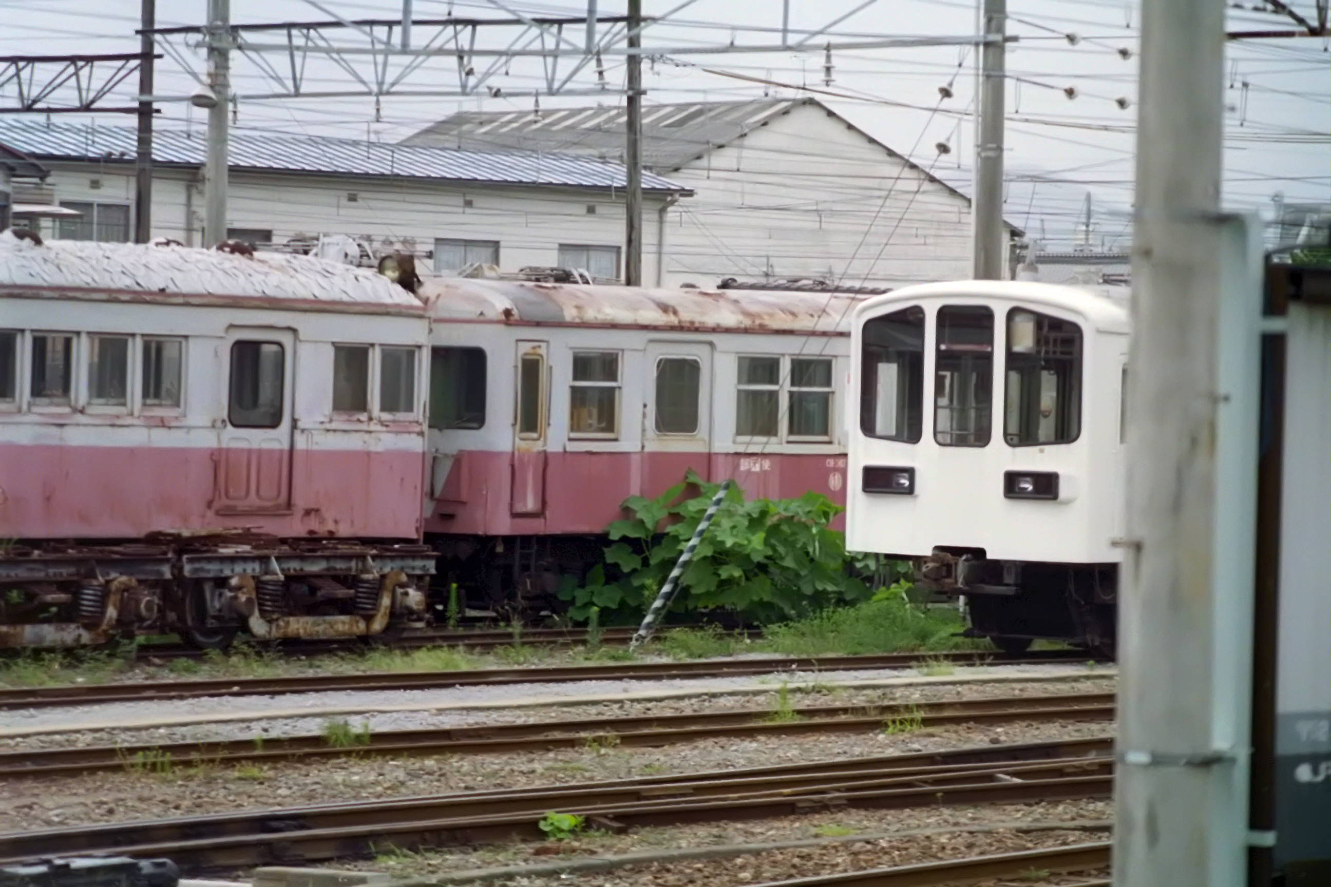 近江鉄道 モユニ11 彦根駅